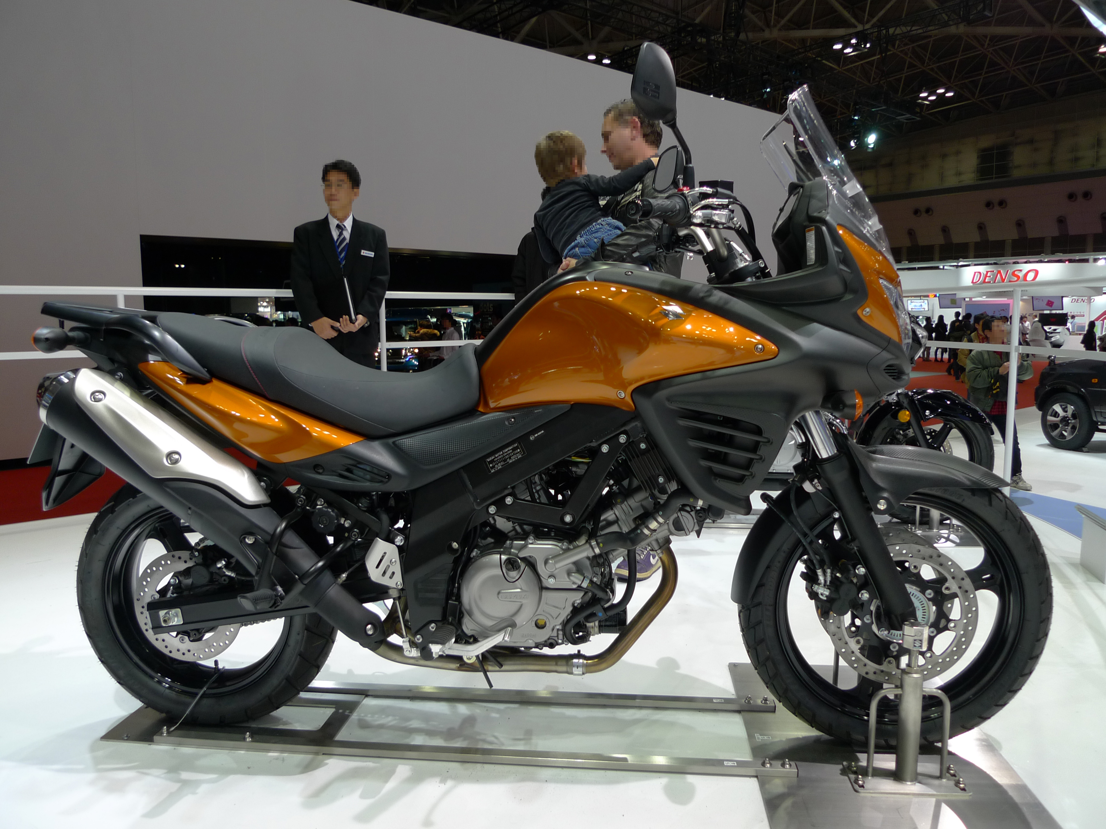 スズキ・V-Strom650 ABS 2012 東京モーターショーにて撮影